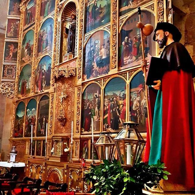 Retablo de la Iglesia de Grañén